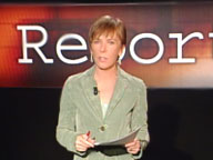 La giornalista Milena Gabanelli mentre conduce una puntata di Report